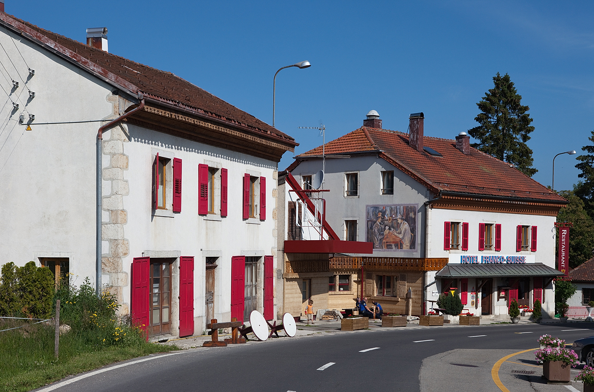 Hôtel Franco-Suisse avant la douane suisse à La Cure (Saint-Cergue)